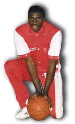 (Autore, Fabio Bernardini (Berns), scattata al Mandela Forum Firenze in occasione del match basket della Liberti Firenze nel 1985. Licenza completa.) Ritoccata con programma sempre da Fabio Bernardini Licensing Categoria:Immagini di pallacanestro